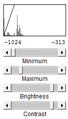 HISTO PULMON